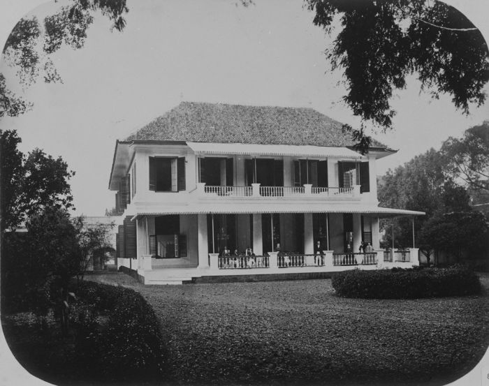 foto. Hotel der Nederlanden, Batavia